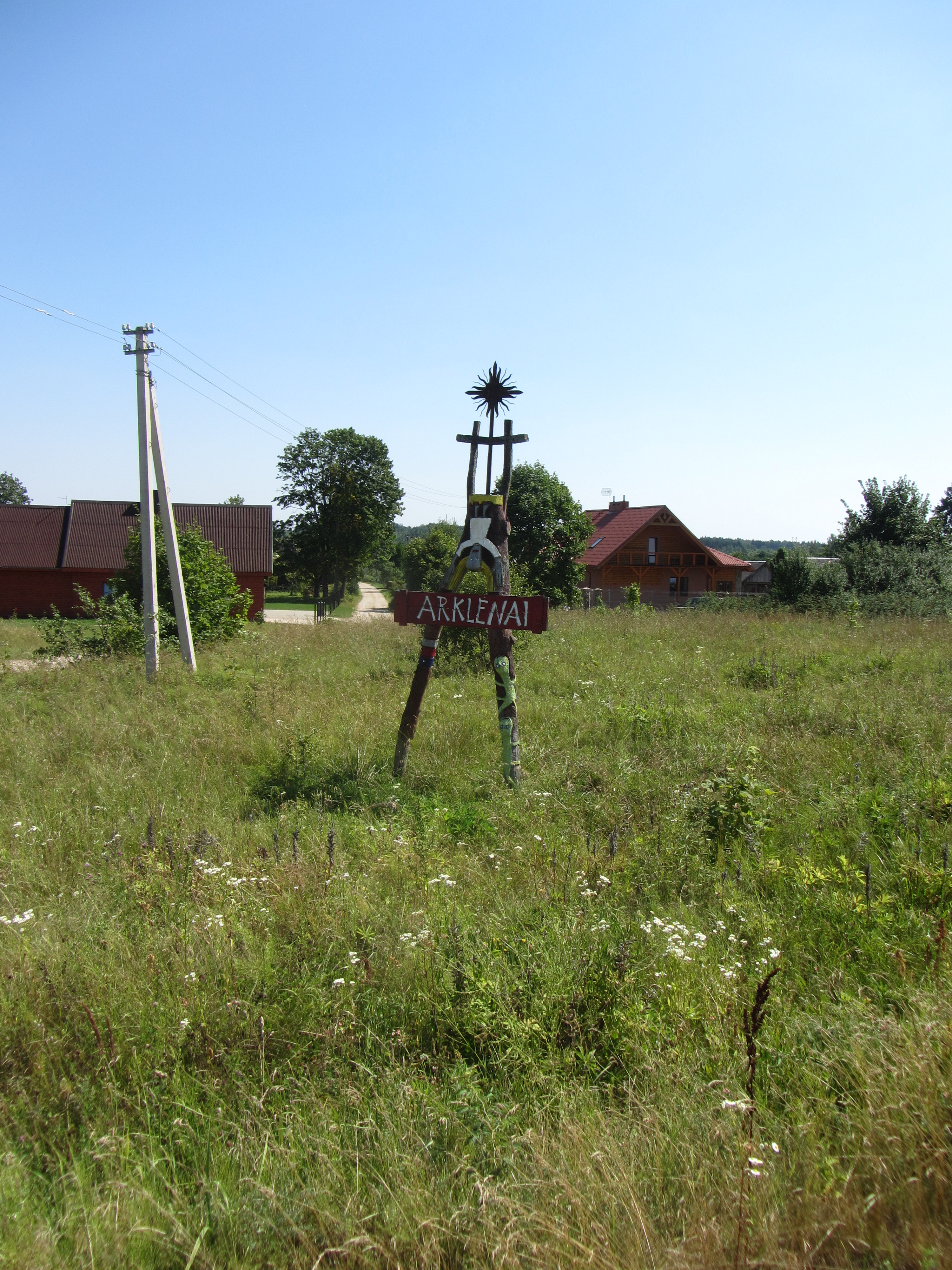 Varkalabiškės 13202, Lithuania